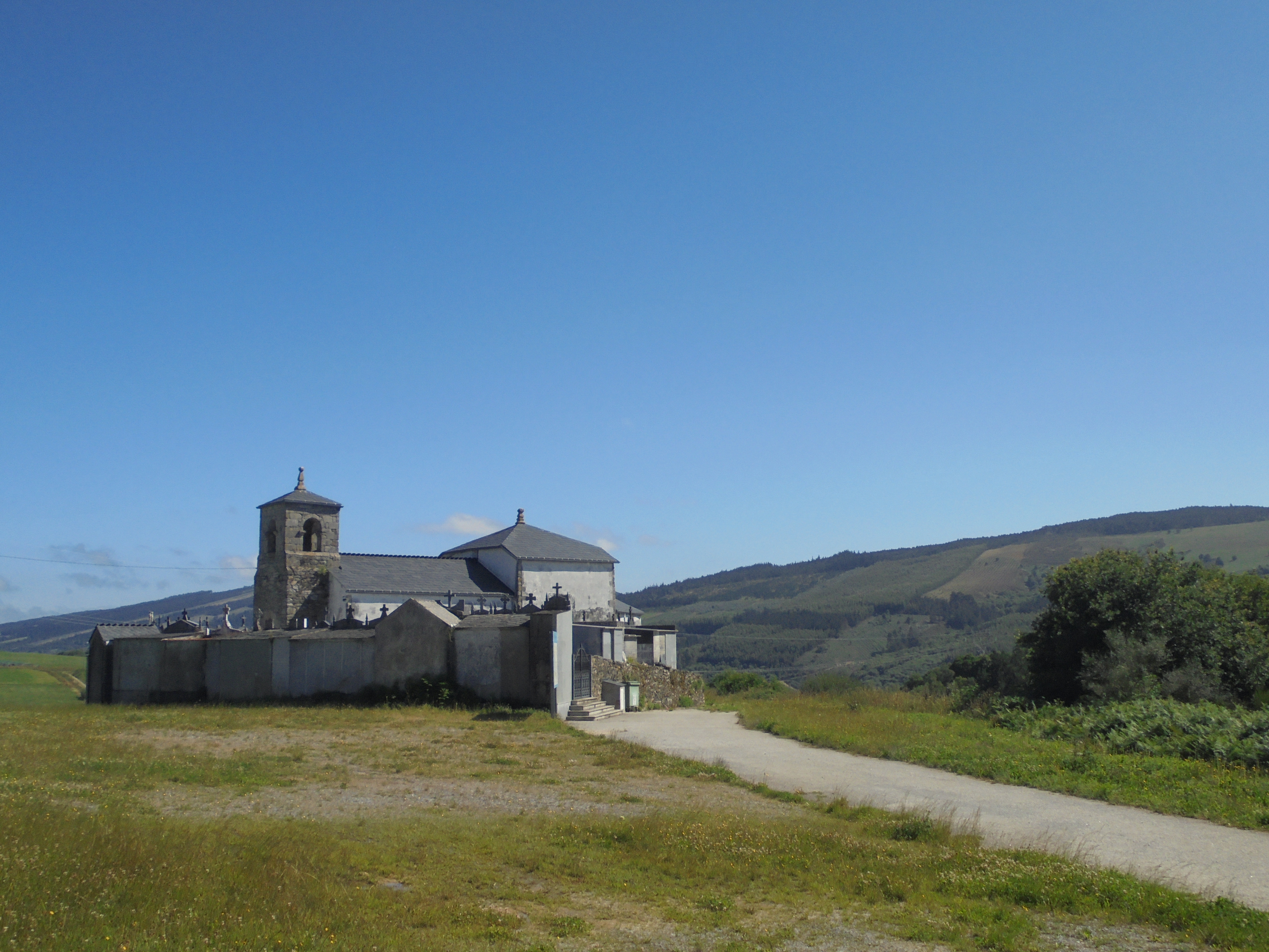 Igrexa parroquial de Librán ( Baleira)